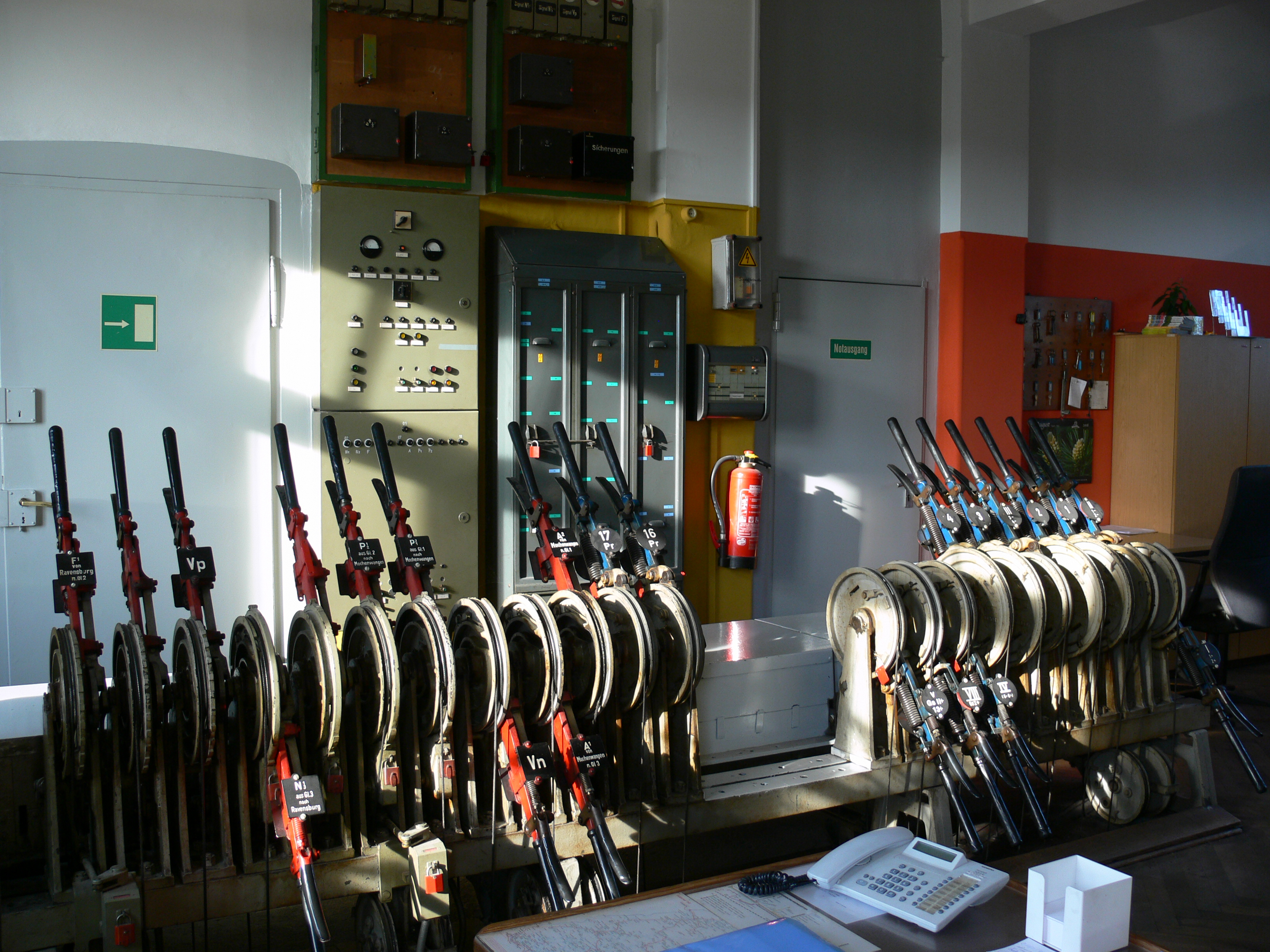 Bahnhof Niederbiegen, mechanisches Stellwerk Bauform Einheit